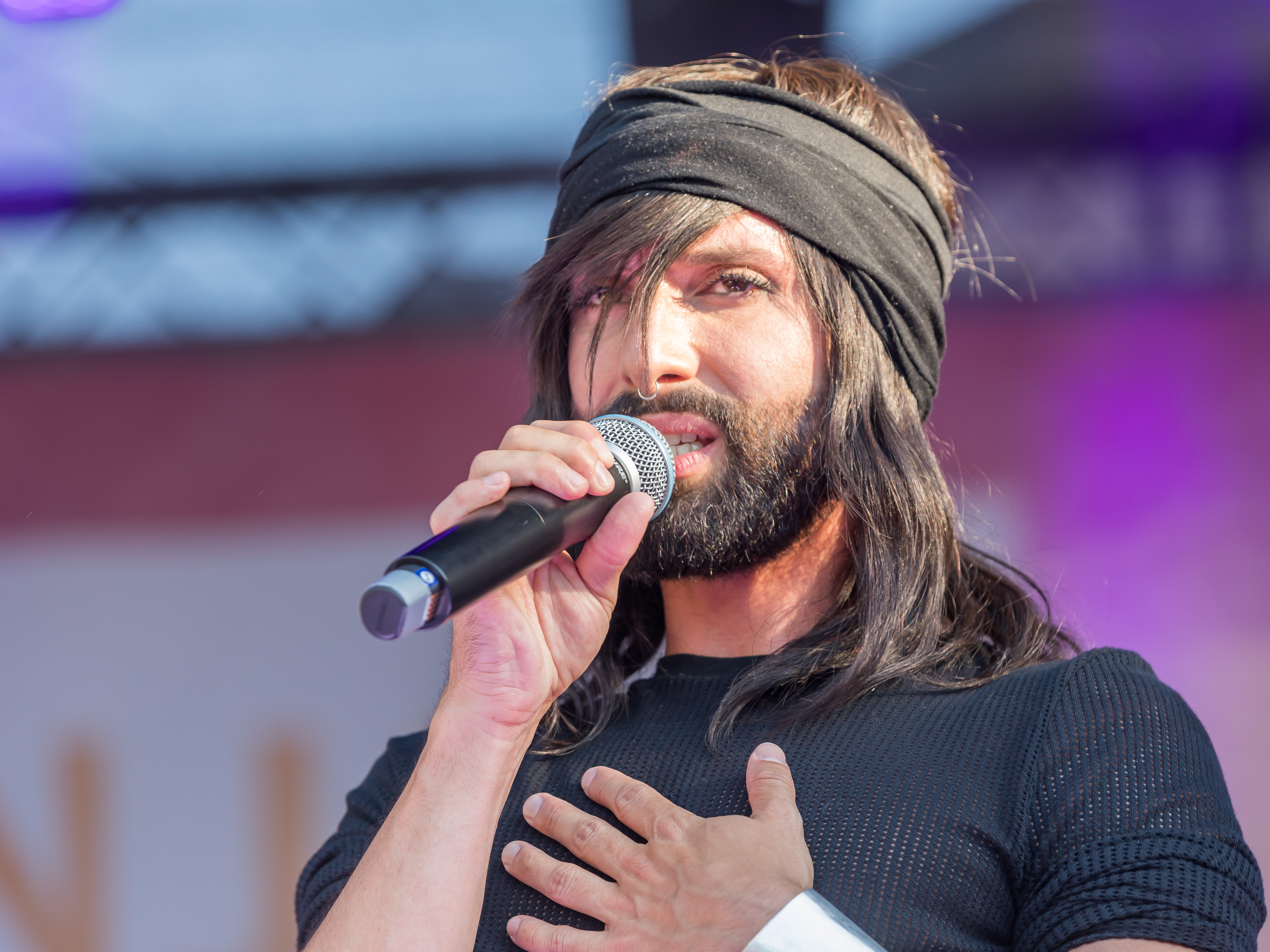 ColognePride/CSD 2018 - Auftritt von Conchita Wurst auf der Hauptbühne, Heumarkt